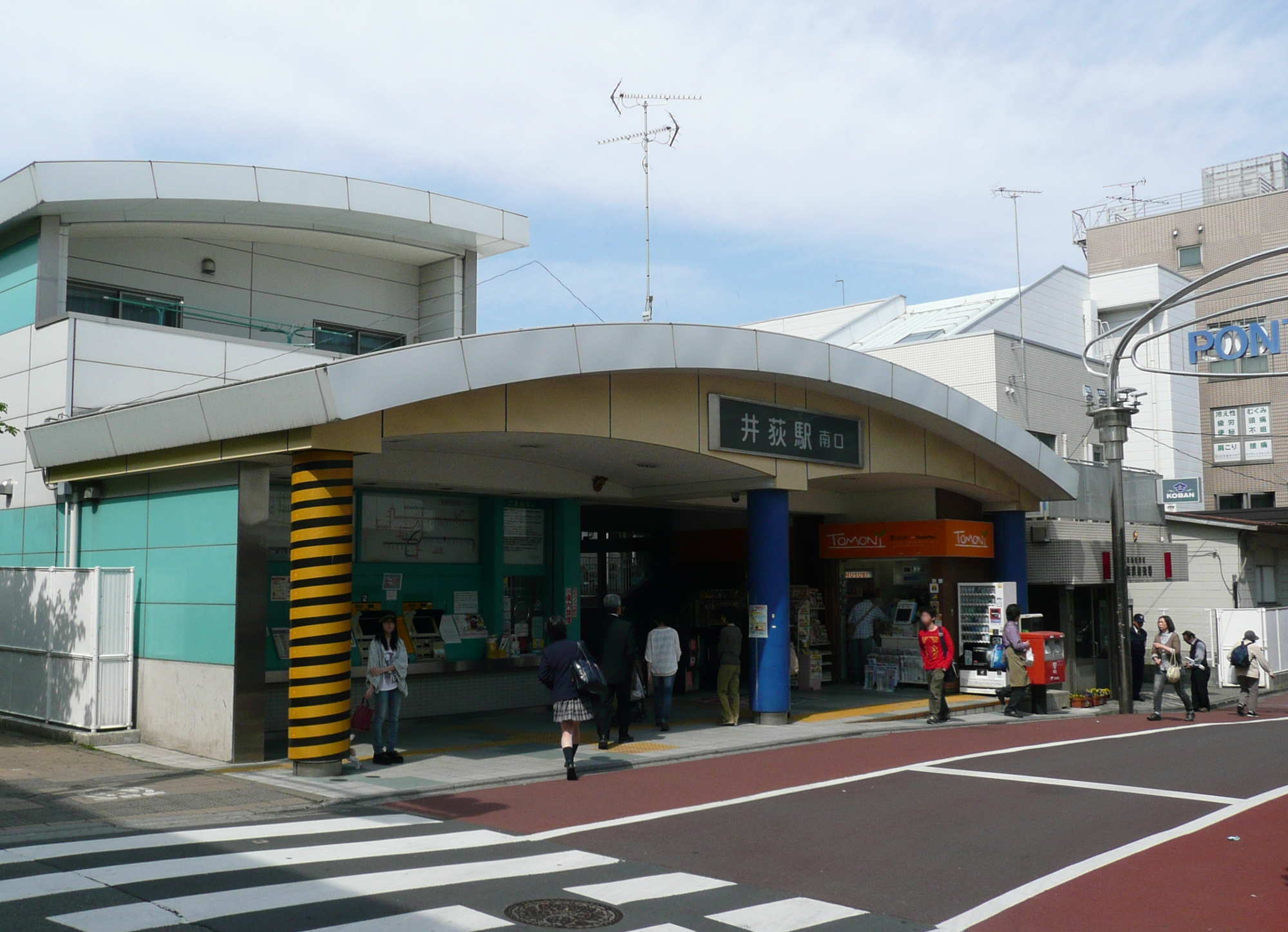 井荻駅南口